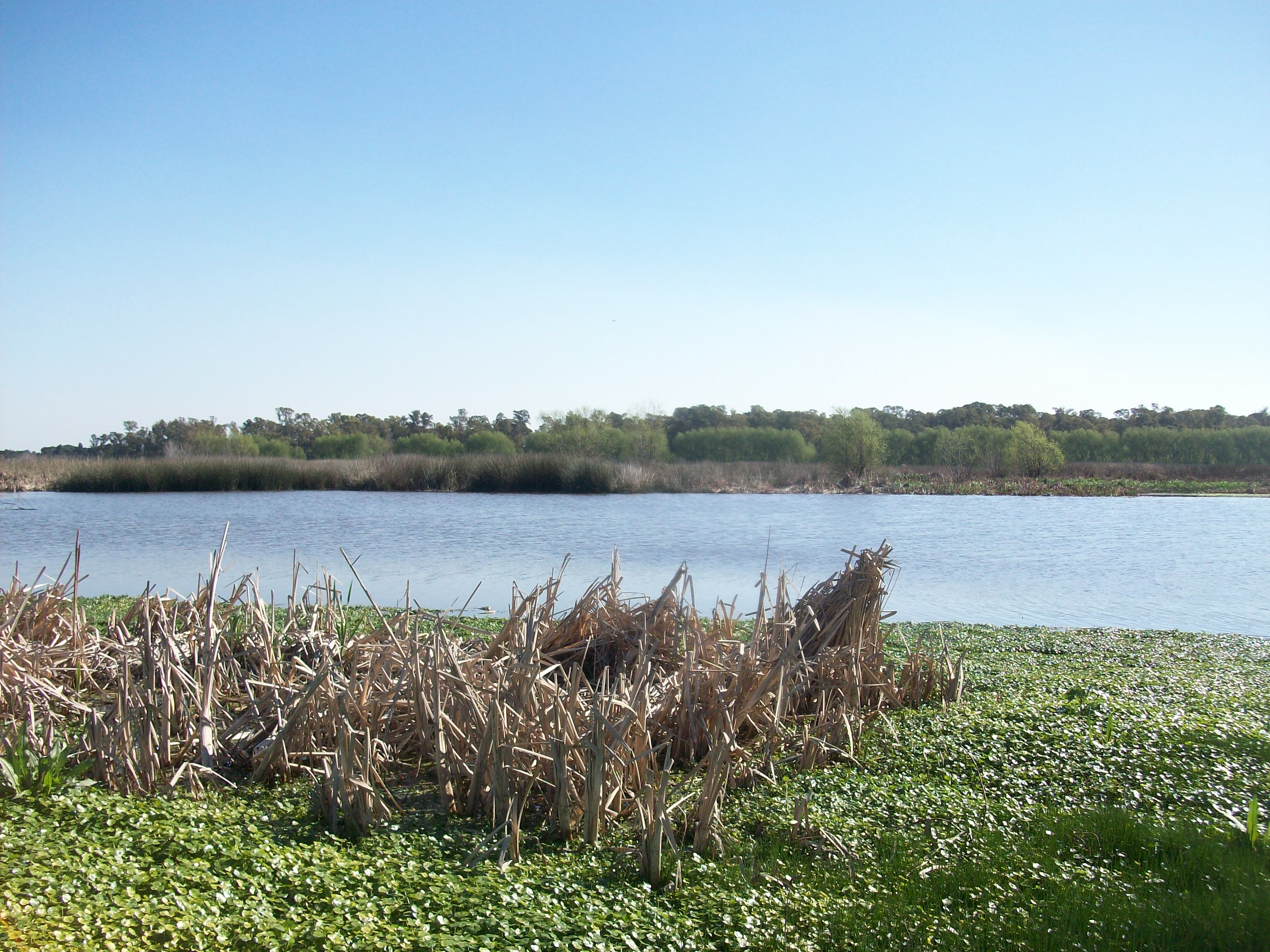 Espejo de la Reserva Natural, Integral y Mixta Laguna de Rocha